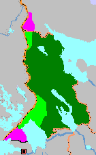 Priskribo Suomalais-karjalainen neuvostotasavalta, kartta. Finnish-Karelian Soviet Republic, map